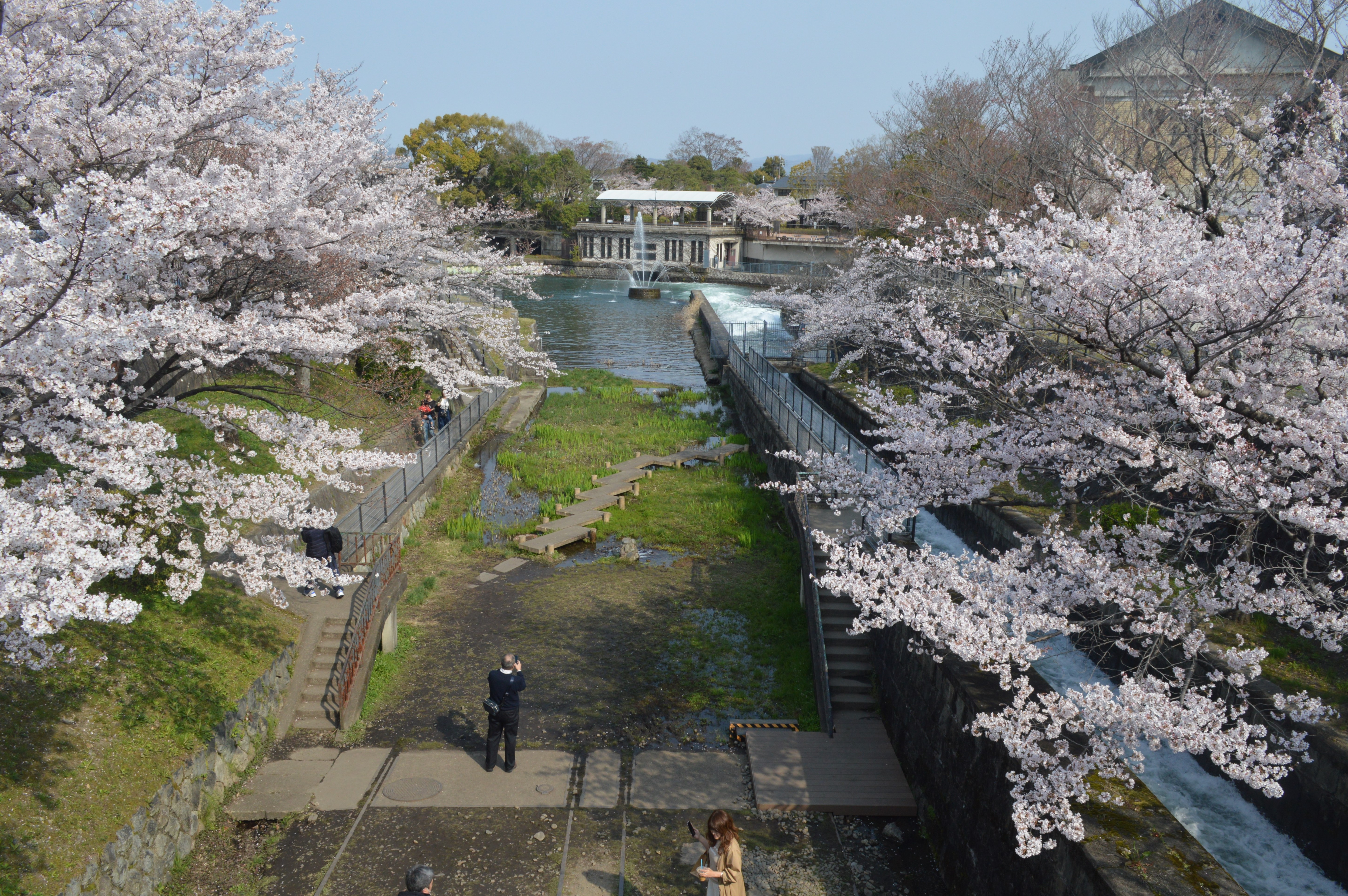 京都府京都市左京区にある蹴上インクライン。奥は京都市動物園。